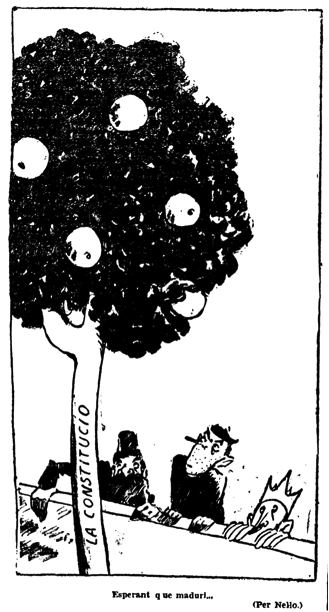 379 25.6.35 humanitat